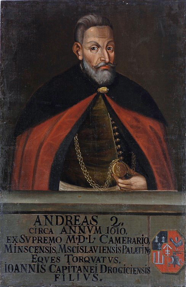 Беларуская (тарашкевіца): Партрэт Андрэя Сапегі (Andrej Sapieha) гербу «Ліс» (каля 1565 — 1611), дзяржаўнага дзеяча Вялікага Княства Літоўскага, ваяводы амсьціслаўскага і кашталяна віленскага